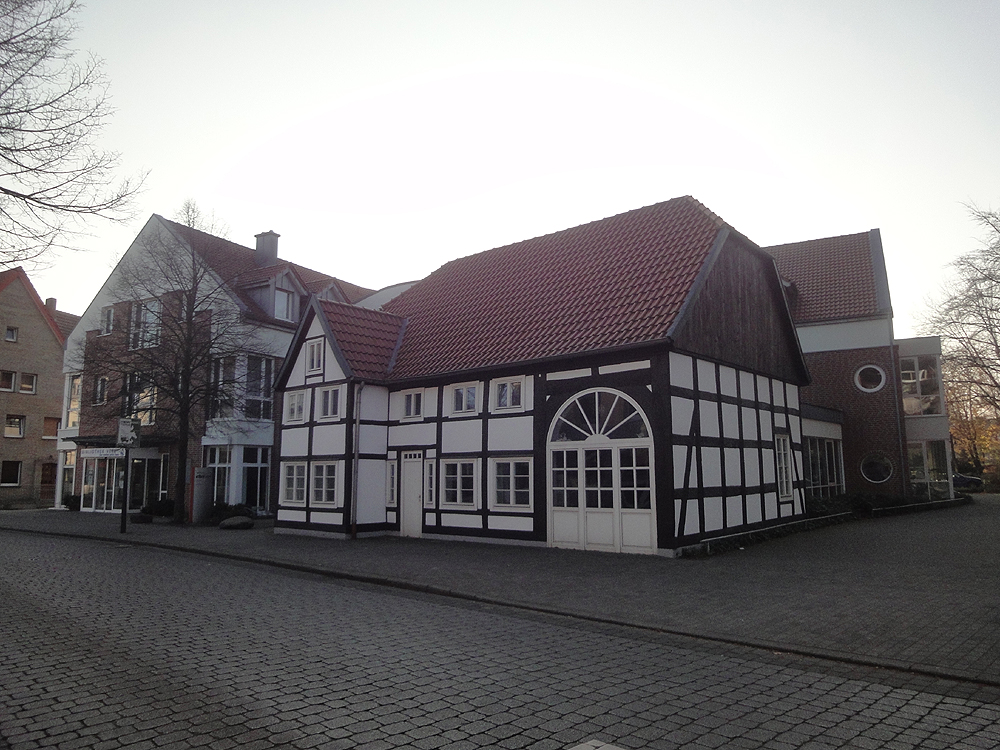 Bibliothek Verl, Ackerbürgerhaus an der Hauptstr. 15